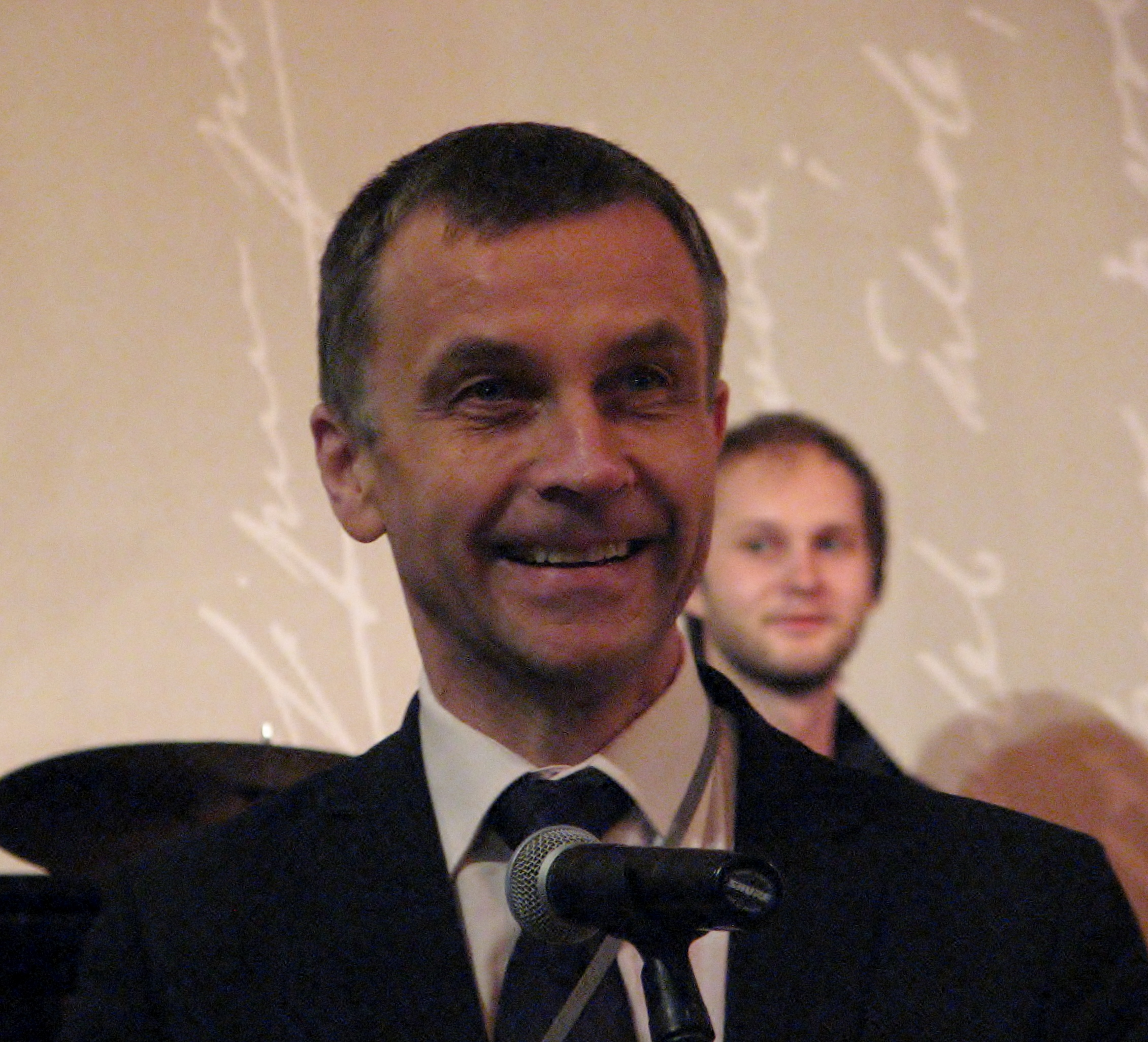 Ilmar Tomusk Nukitsa konkursi auhinda saamas